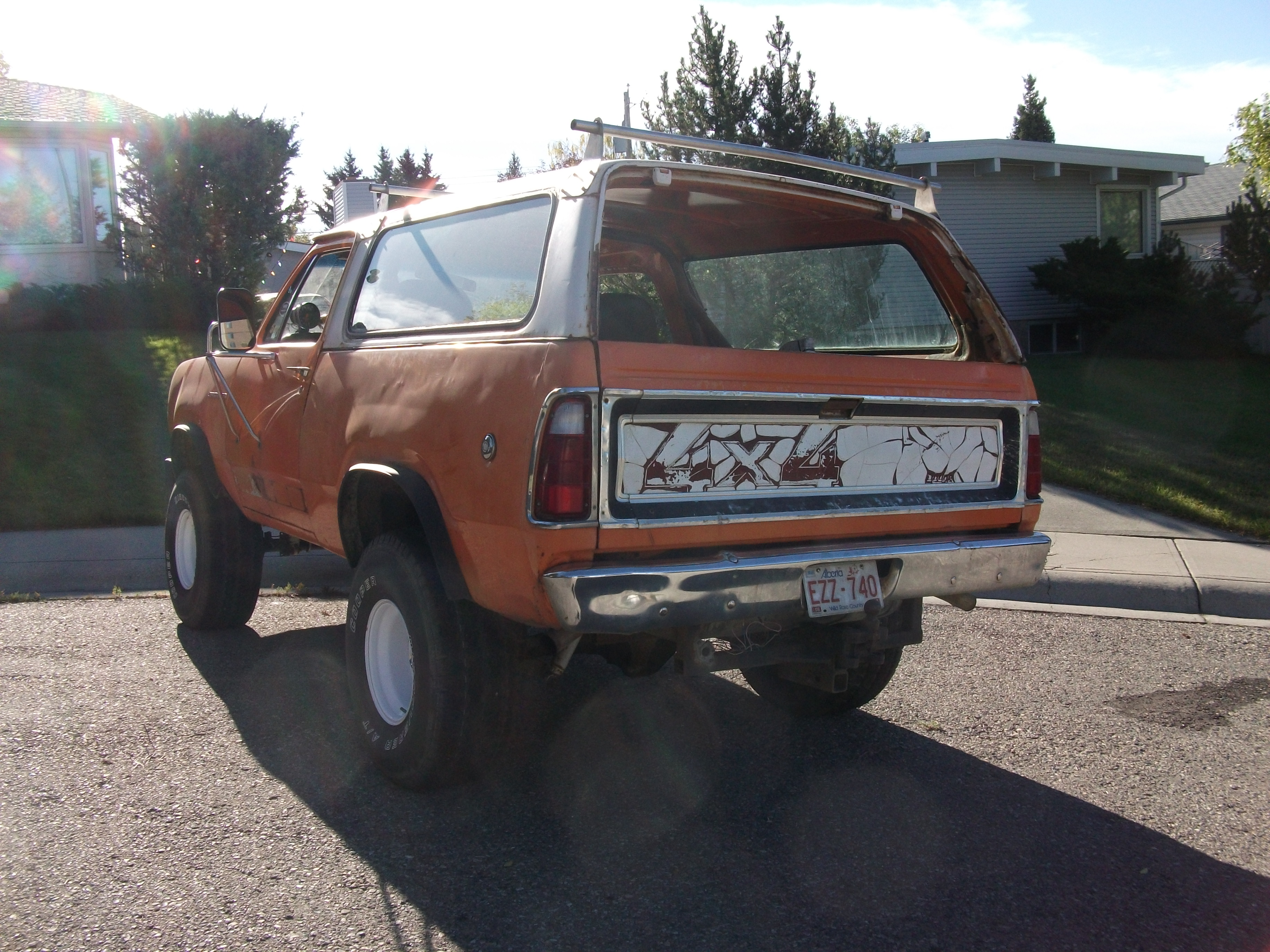 Dodge Ram Charger